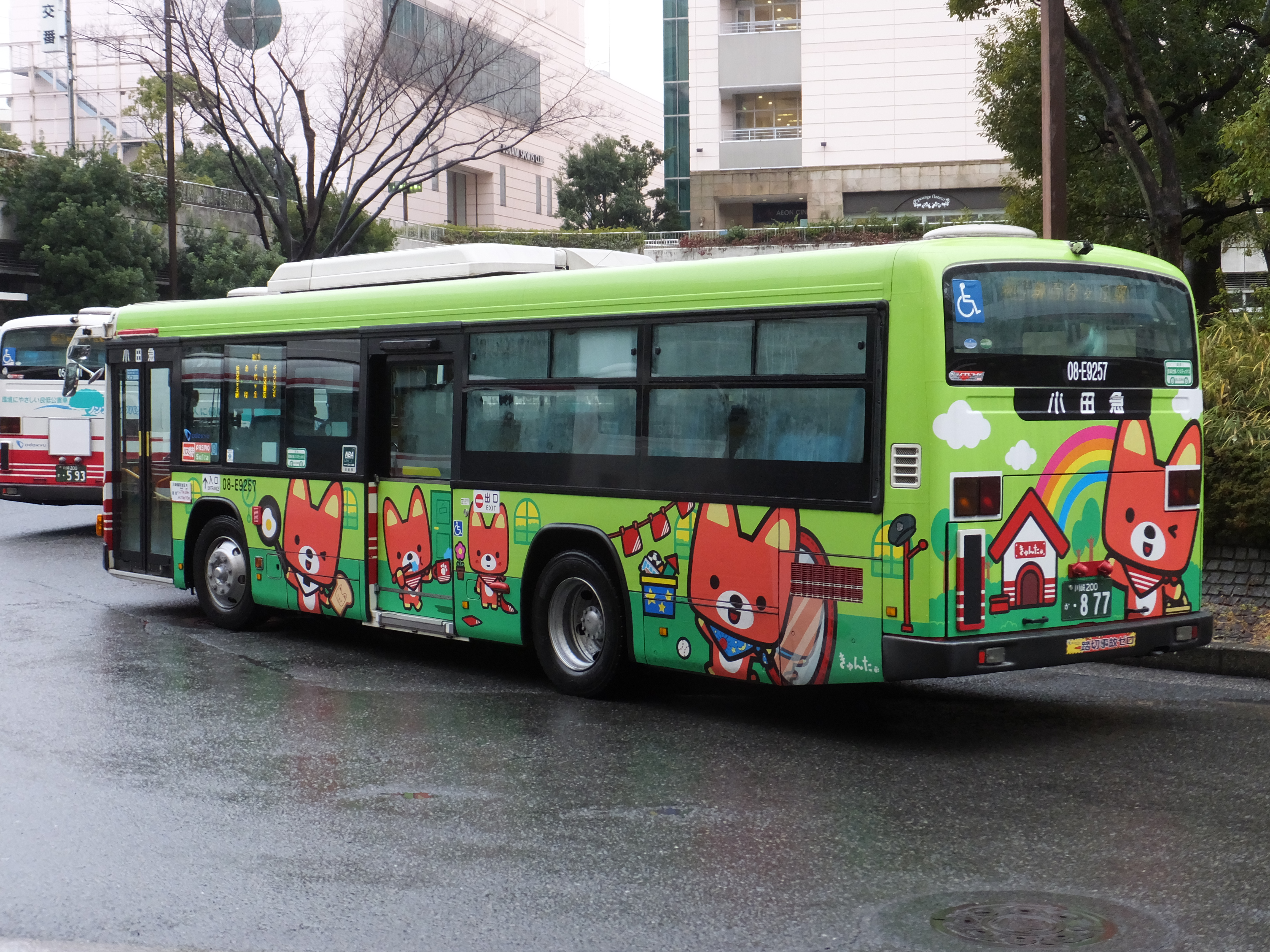 小田急バス登戸営業所 08-E9257号車 きゅんたラッピング（新百合ケ丘駅にて撮影）